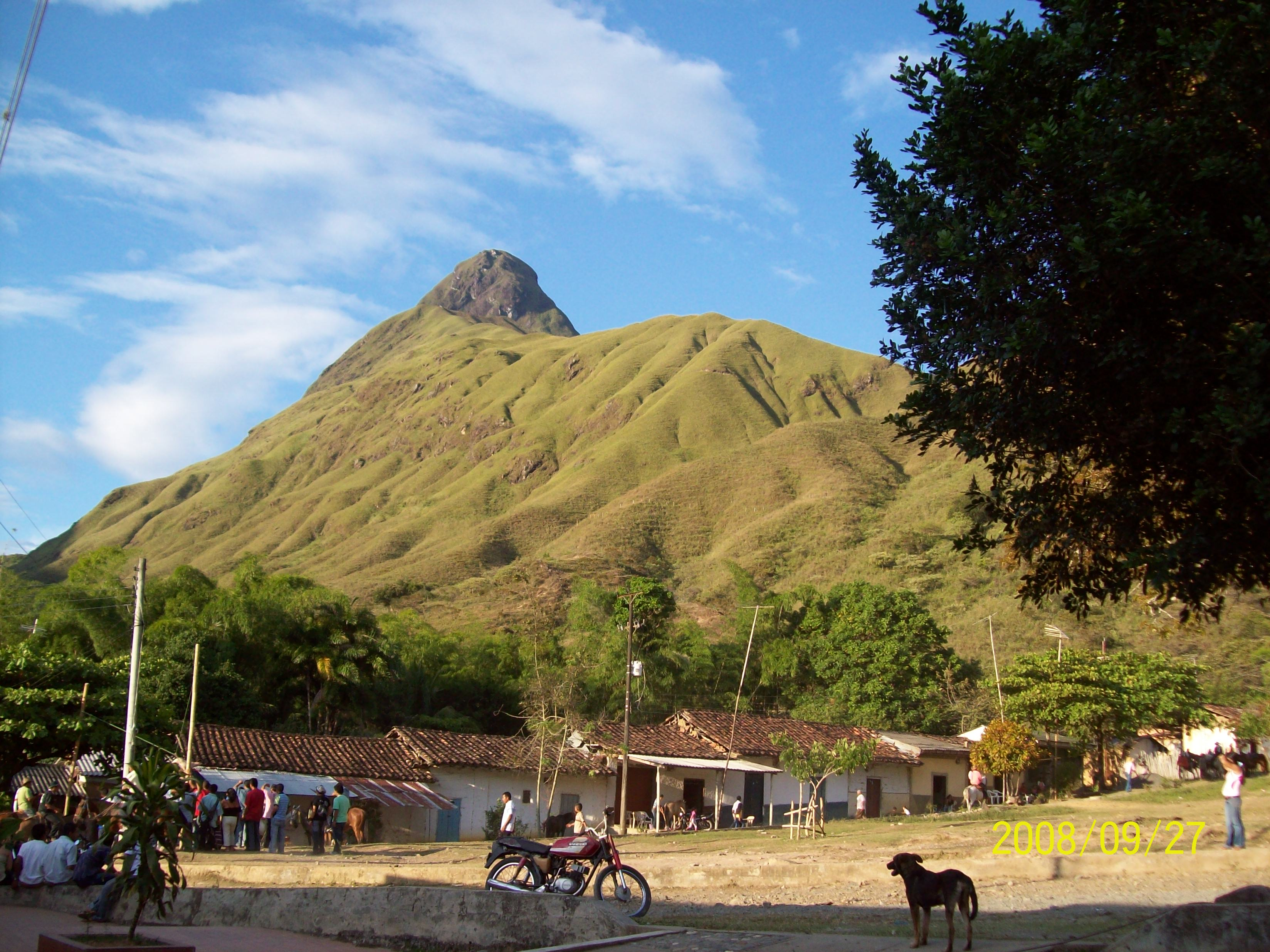 Panoramica del Cerro de Lerma Cauca, Colombia